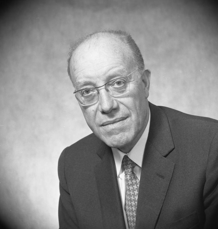 Prof. Heinz Maier-Leibnitz, Präsident der Deutschen Forschungsgemeinschaft